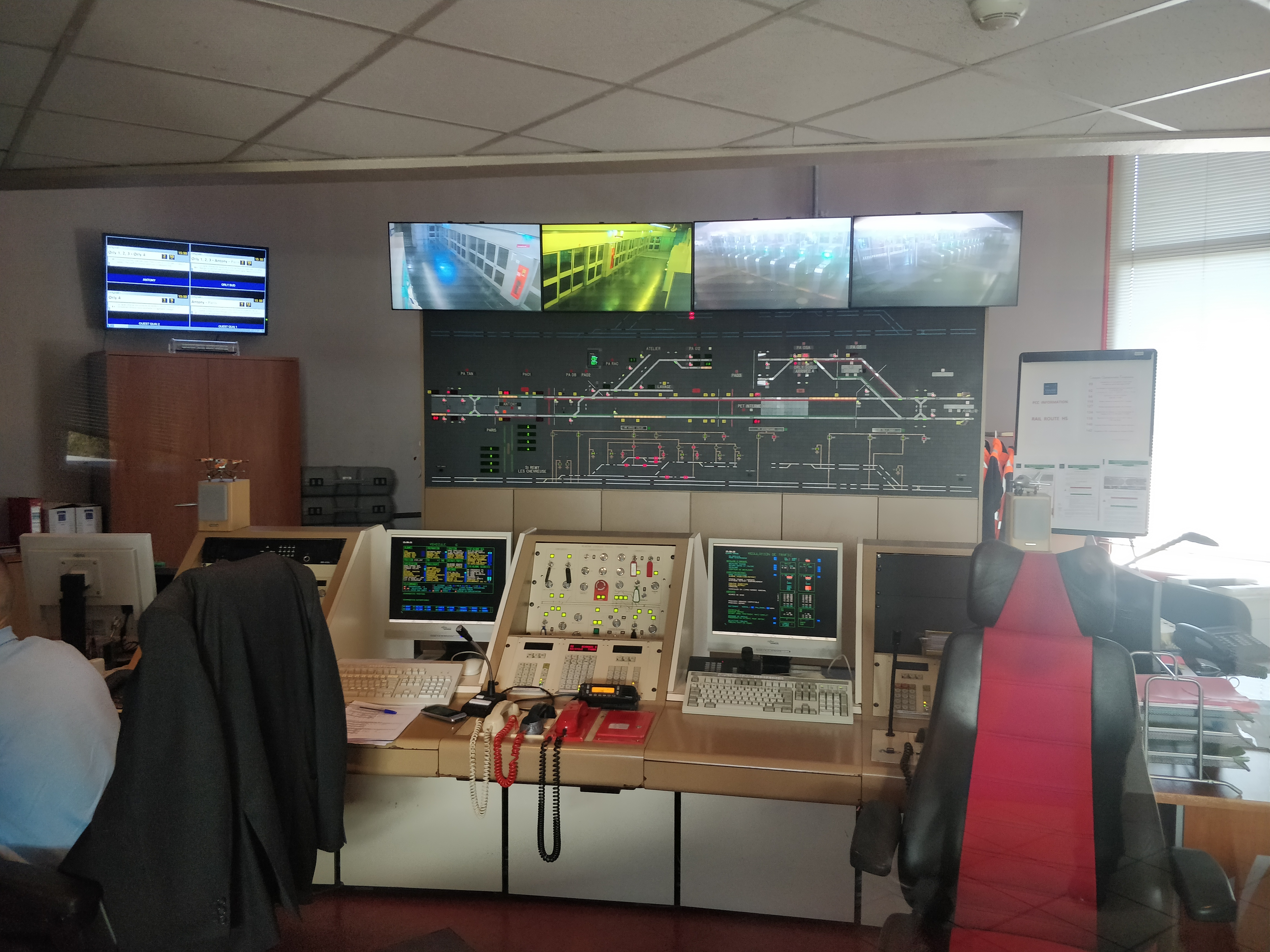 Panneau de contrôle de la ligne Orlyval, au siège d'Orlyval.